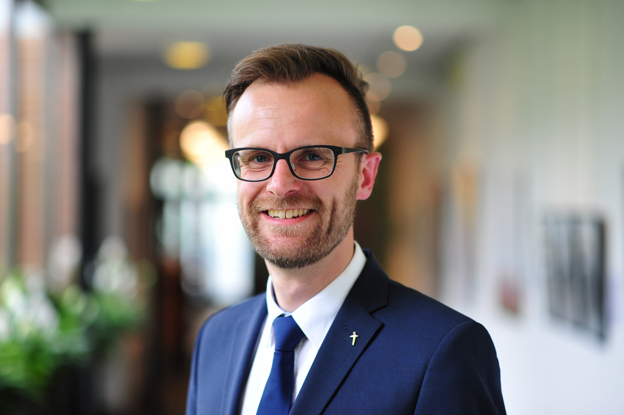 Lars Müller-Marienburg ist der designierte Superintendent der Diözese Niederösterreich. Amtsantritt ist der 1. September 2016.